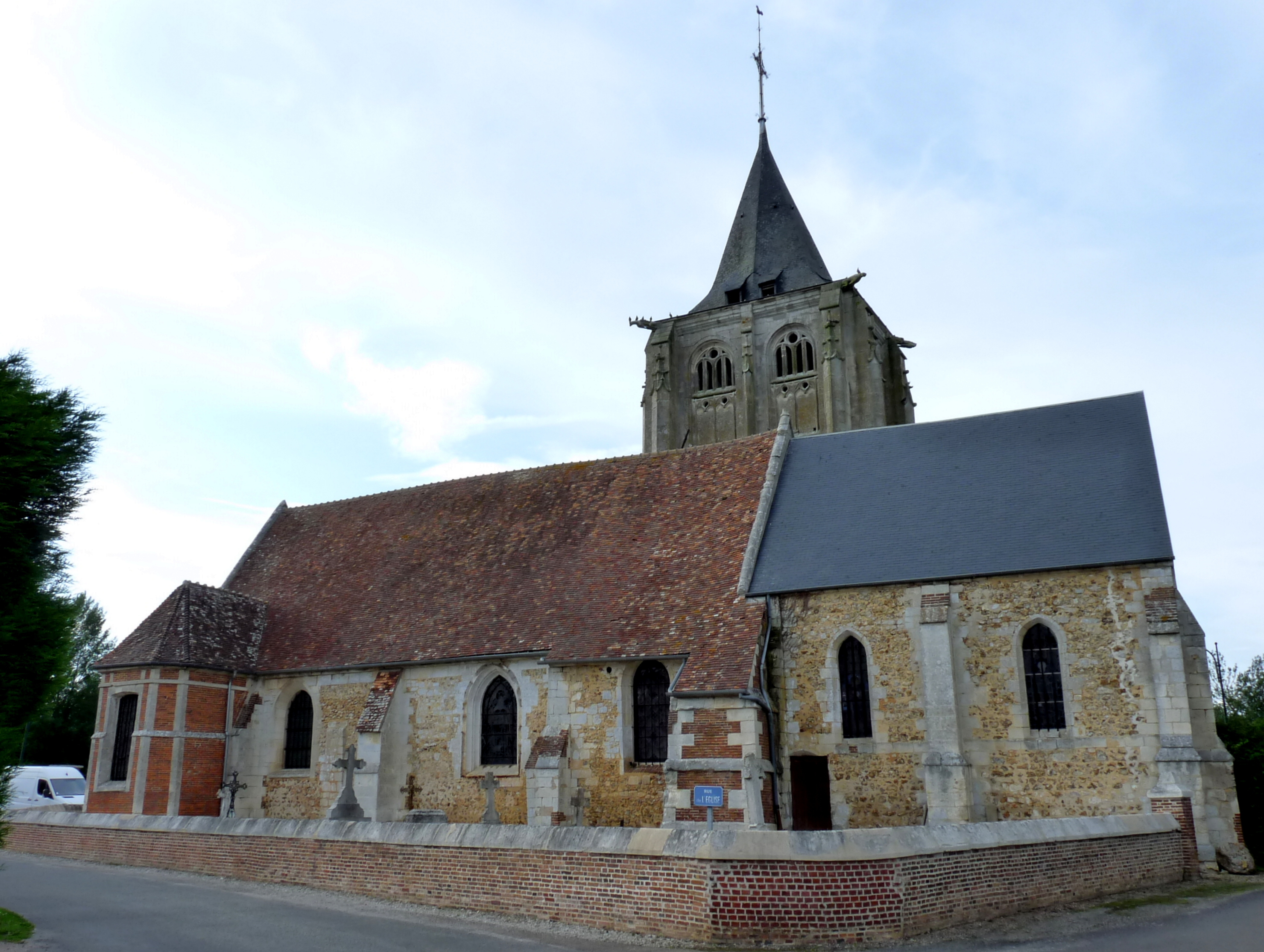 Église Saint-Crépin-et-Saint-Crépinien de Barc It is indexed in the Base Mérimée, a database of architectural heritage maintained by the French Ministry of Culture, under the references PA00099316 and IA00018729 .